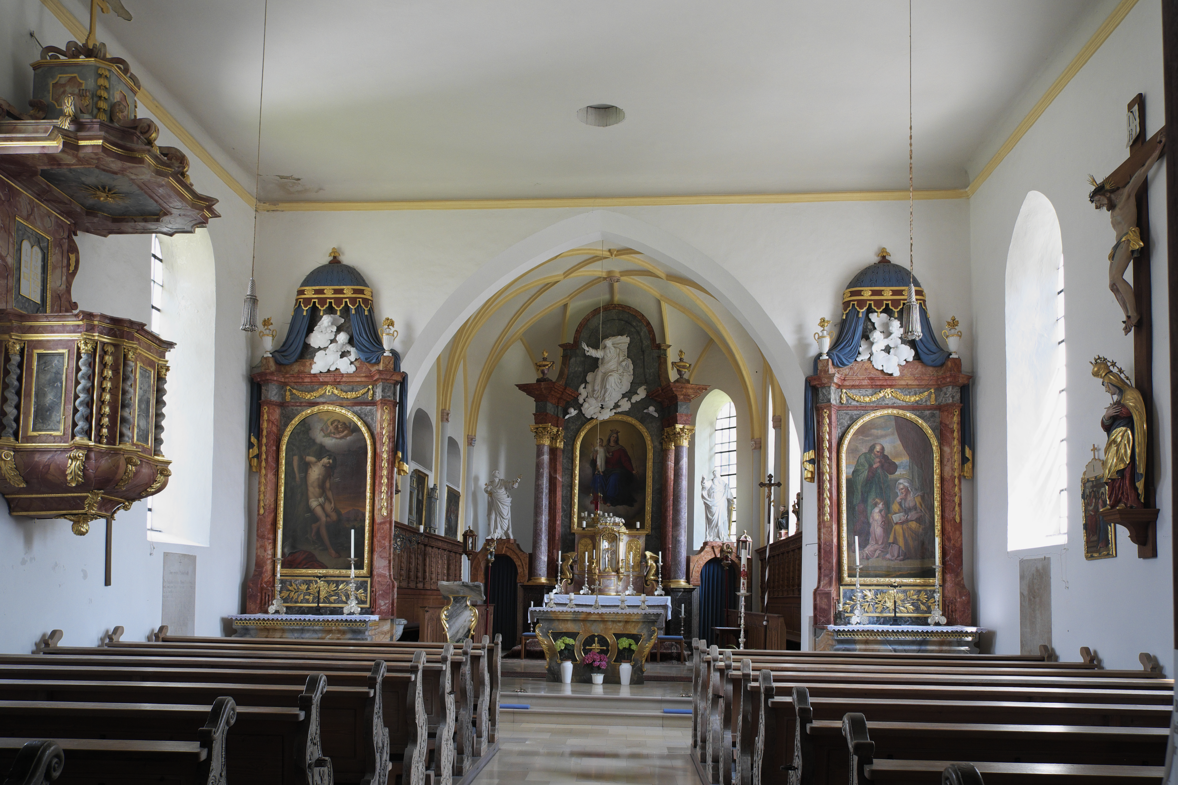 Katholische Filialkirche St. Peter und Paul in Holzkirchen (Alling) im Landkreis Fürstenfeldbruck (Bayern/Deutschland)